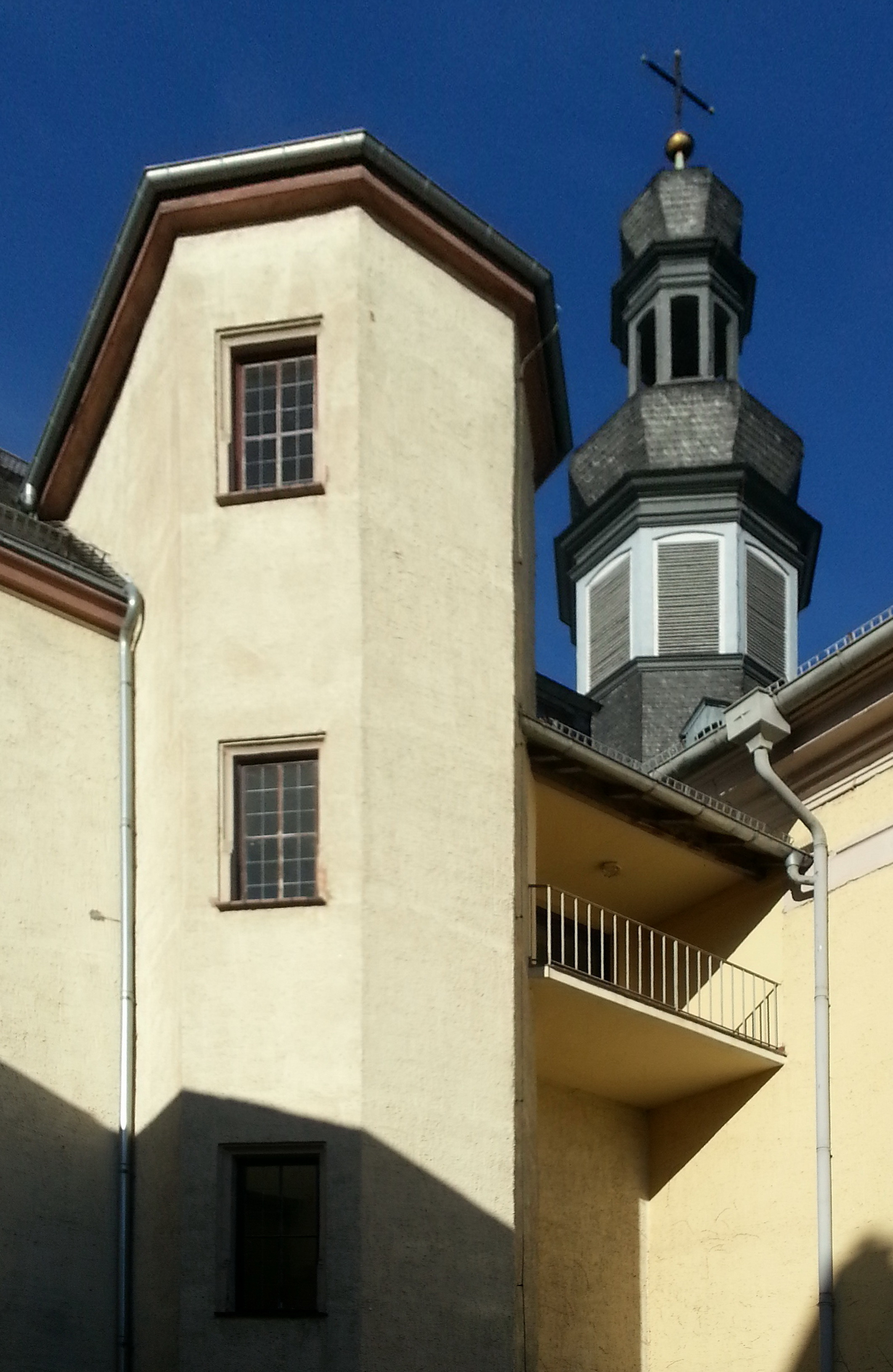 An der Rückseite des Roten Hauses ist ein Treppenturm aus der Renaissance angefügt.